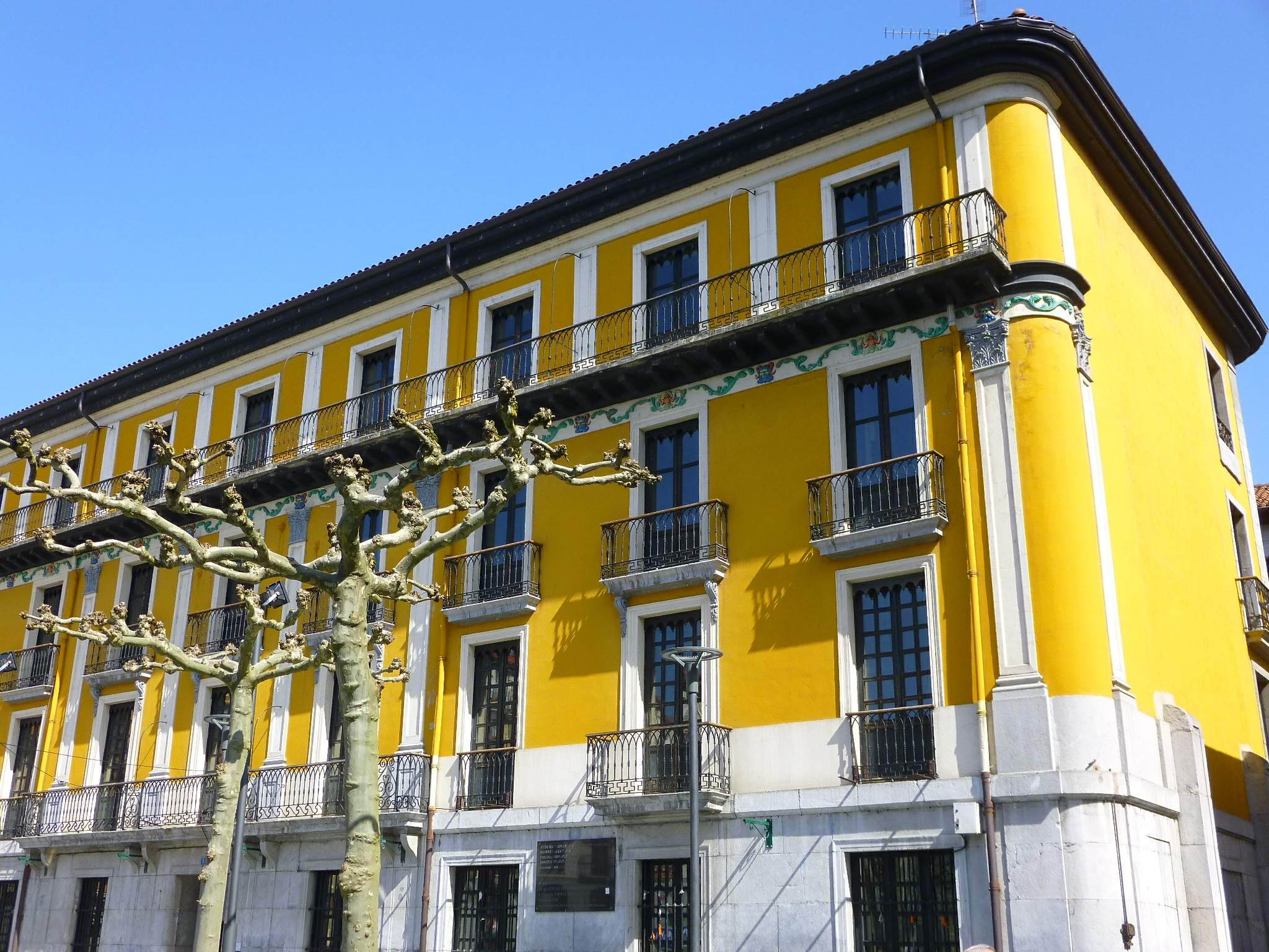 Casa de la Cultura de Tolosa (ex Diputación de Guipúzcoa)